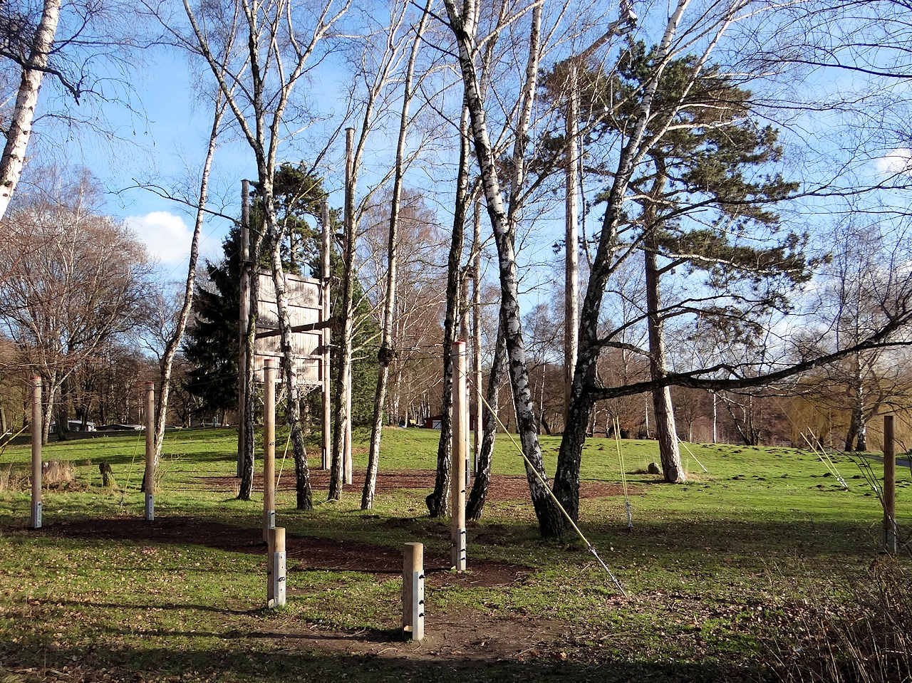 Hochseilgarten auf dem Gelände des Kennelbads, Blickrichtung Osten.